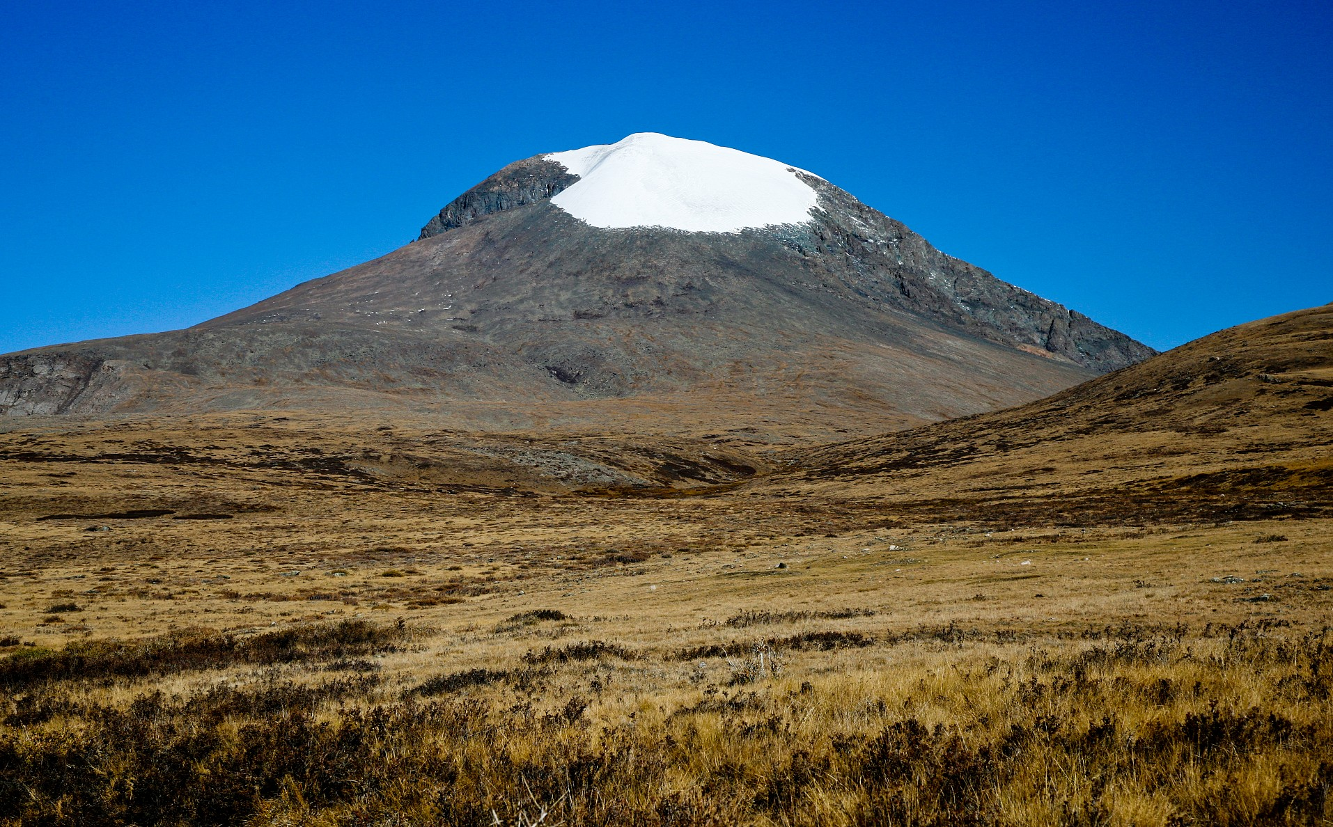 Otgon Tenger im September 2009 von Osten